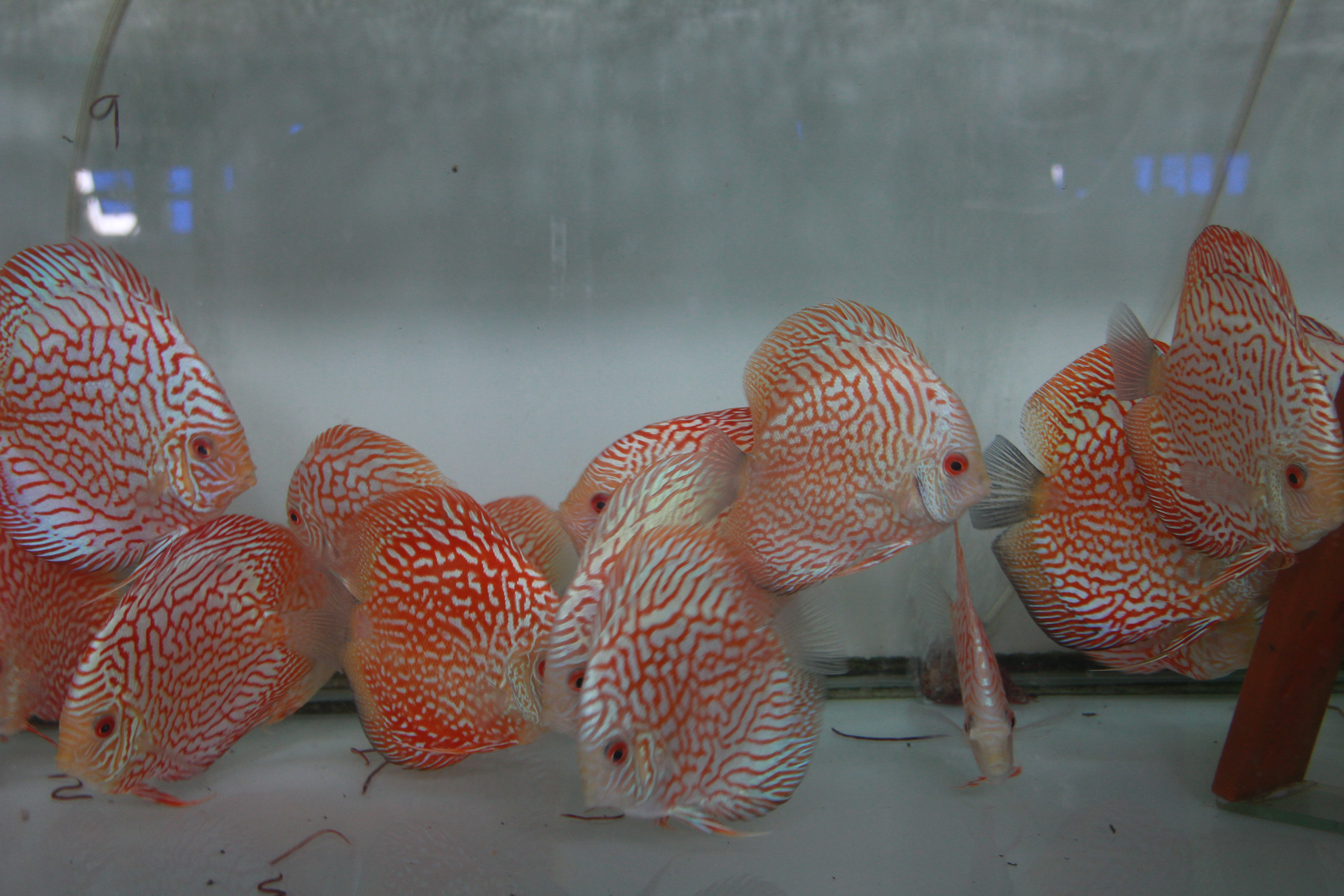 Hình tự chụp bằng máy ảnh kỹ thuật số một đàn có dĩa hồng tại Khu Nông nghiệp công nghệ cao ở Củ Chi